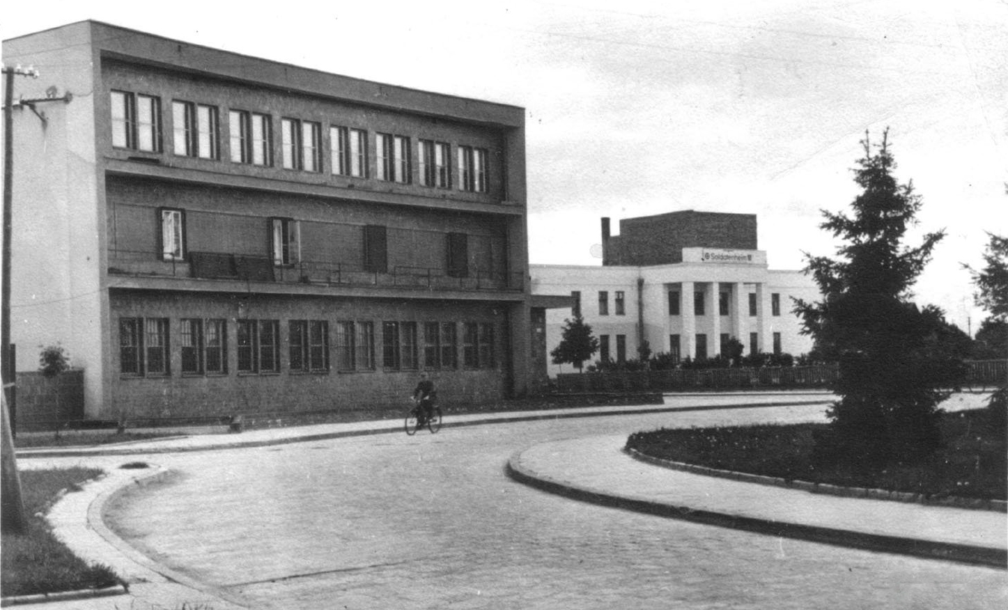 Беларуская (тарашкевіца): Баранавічы (Baranavičy), вуліца Паштовая (vulica Paštovaja). Пошта і тэатар